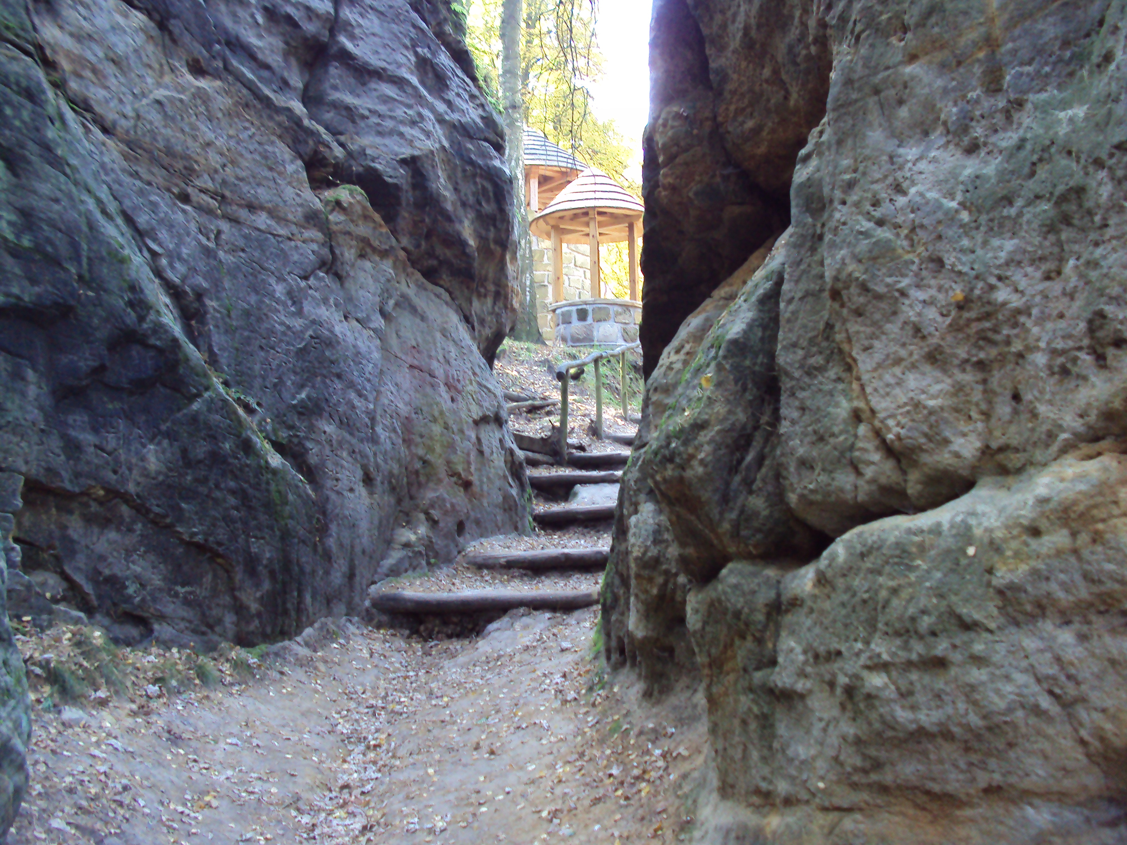 Průchod k amfiteátru lesního divadla Sloup v Čechách